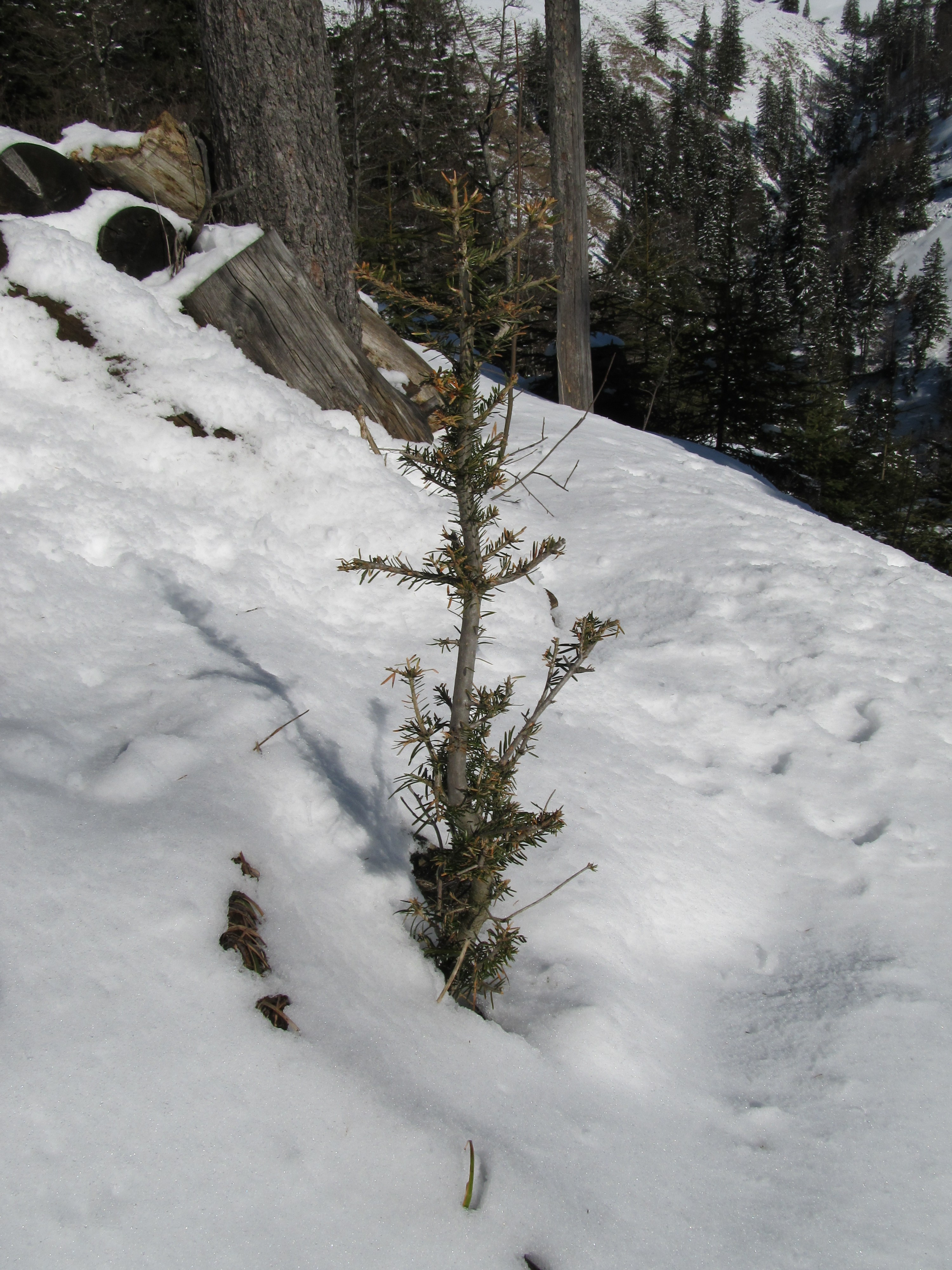 Wildverbiss an junger Weiß-Tanne